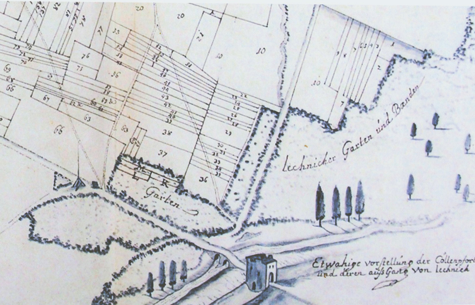 Lechenicher Flurkarte, Bonner Tor und Bogenbrücke über Stadtgraben und Rotbach auf einer Flurkarte des Stiftes St. Aposteln in Köln. Ausschnitt aus einer Zeichnung des „Geometers” Mathias Ehmands, 1752